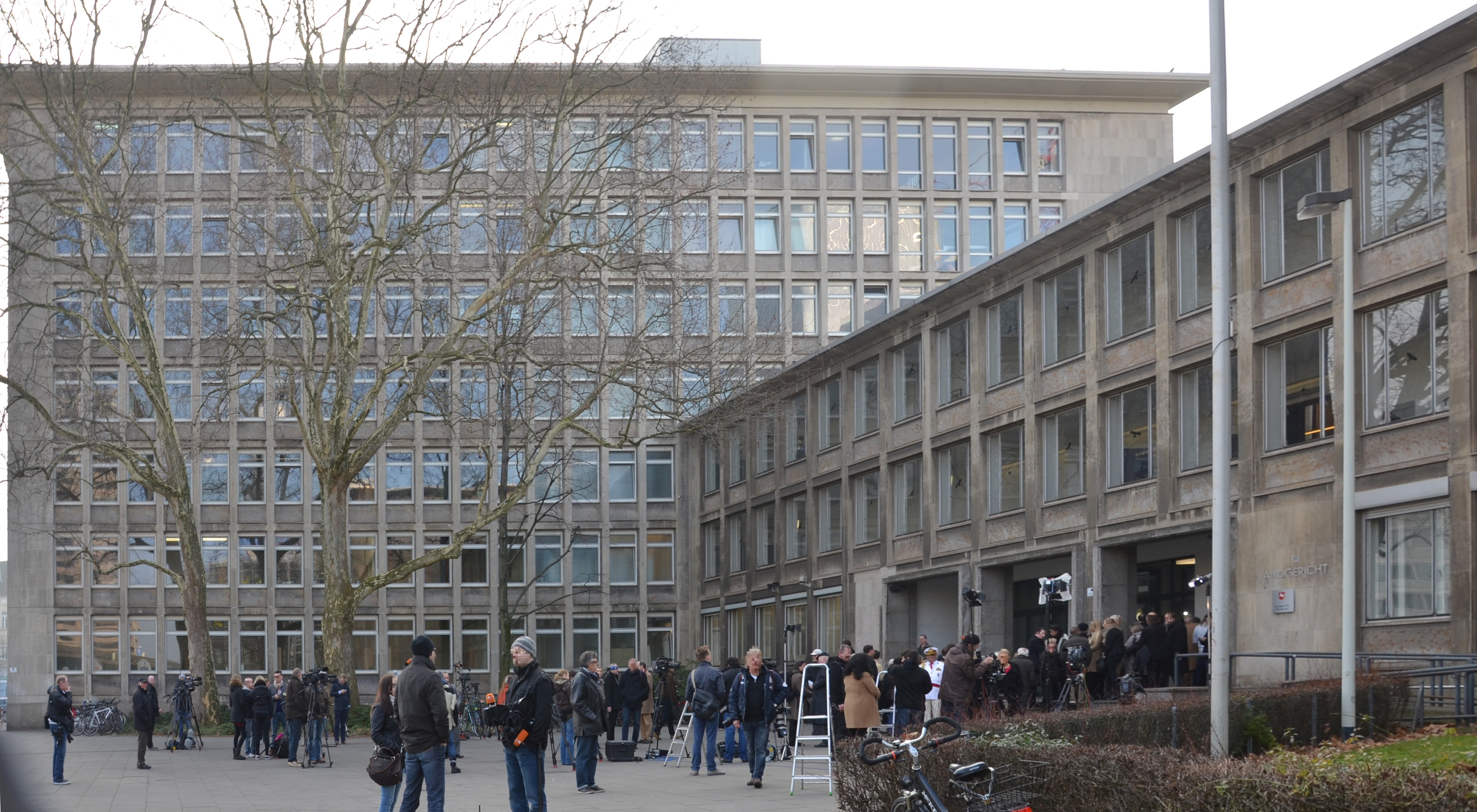 Ein Eindruck vom Tag des Freispruches für Bundeskanzler a.D. Christian Wulff und David Groenewold vor dem Landgericht Hannover ...